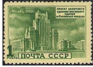 Почтовая марка СССР № 1581. Проект высотки на Смоленской площади